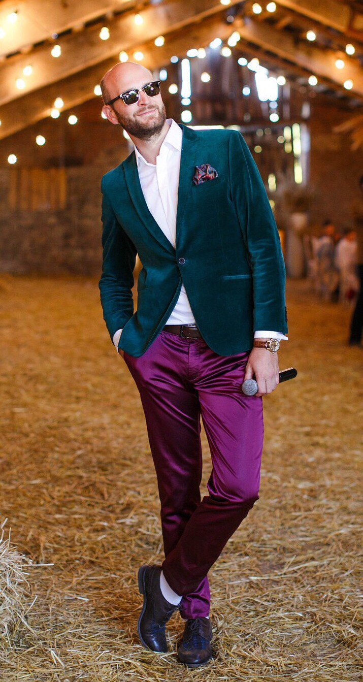 Проведение мероприятий любого масштаба